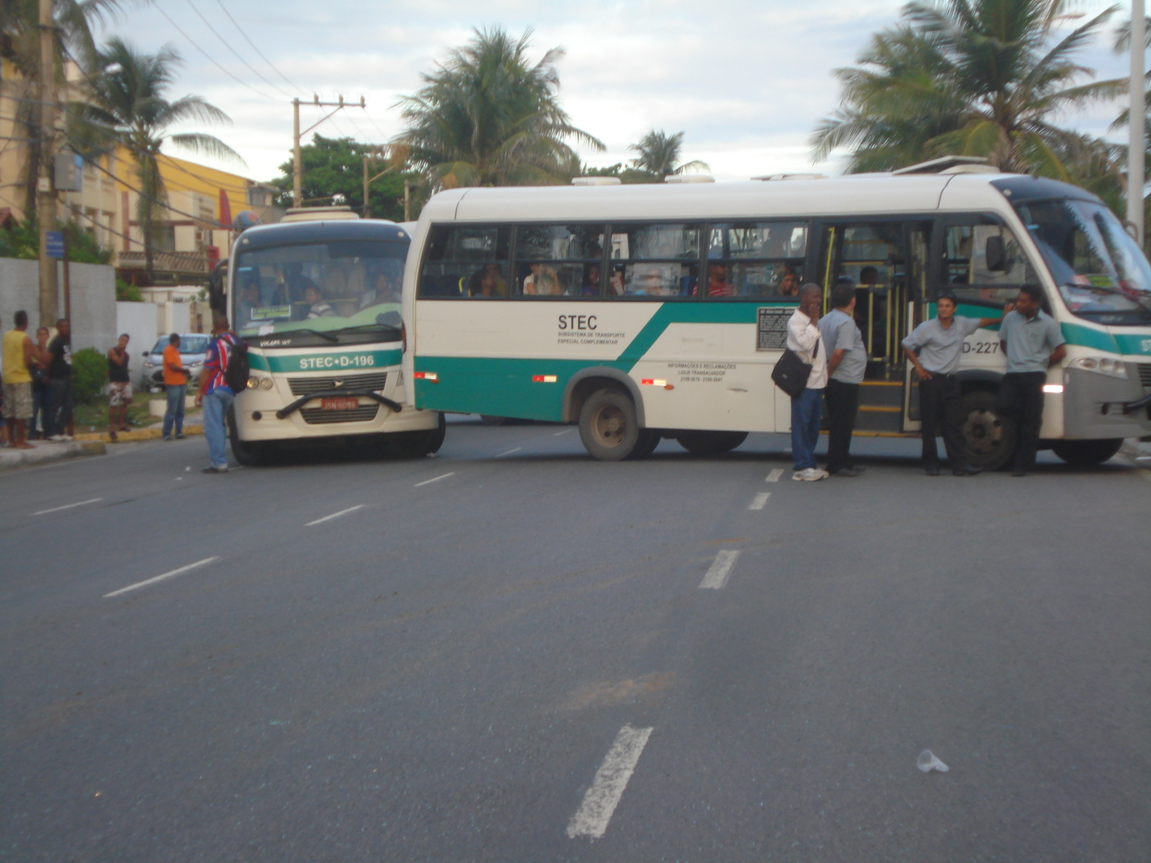 Micro-ônibus do Subsistema de Transporte Especial Complementar (STEC) de Salvador, atravessados na Avenida Otávio Mangabeira.